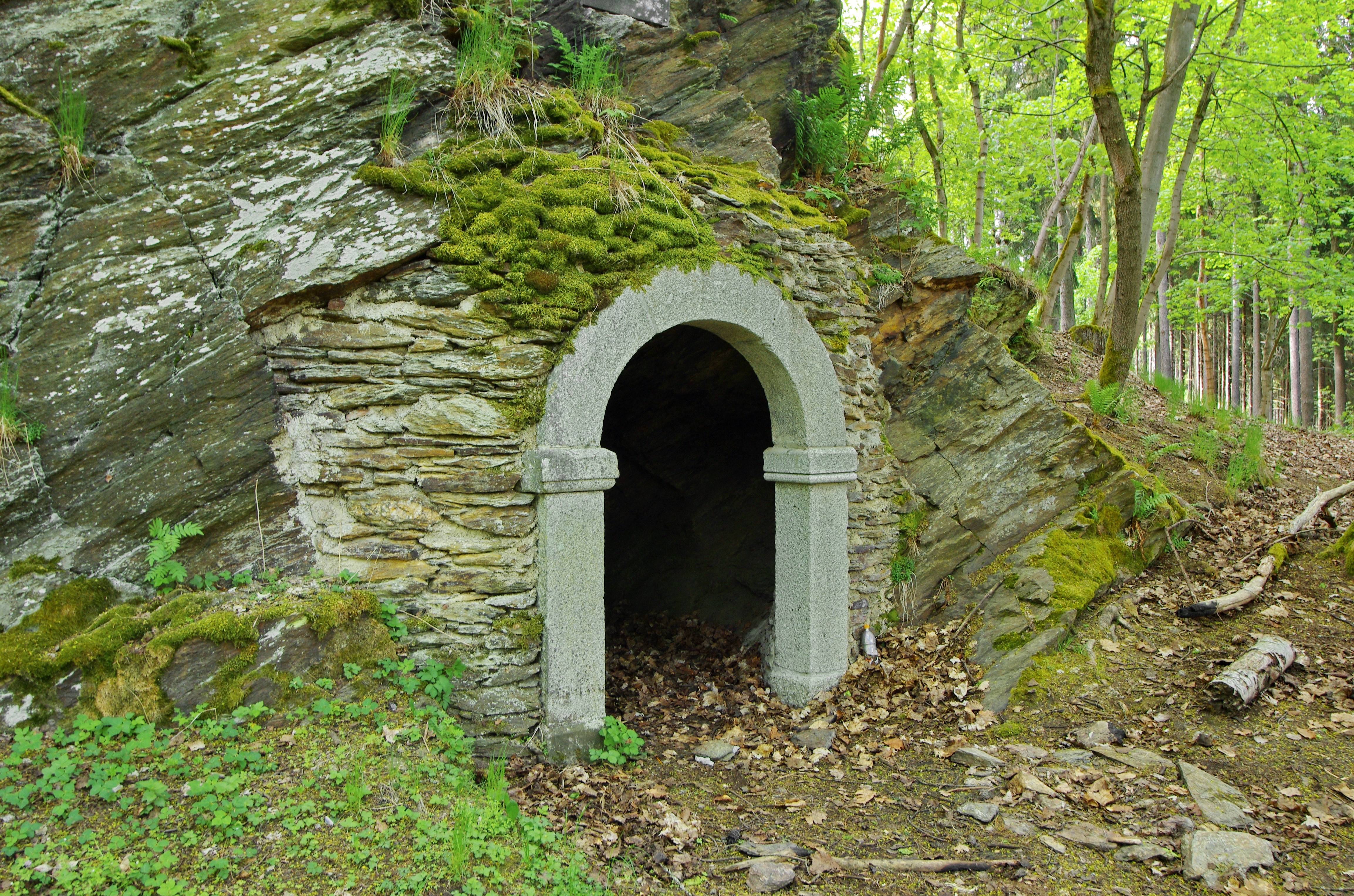 Kraslice, skalní jeskyně na Hradišti opravená v roce 2007